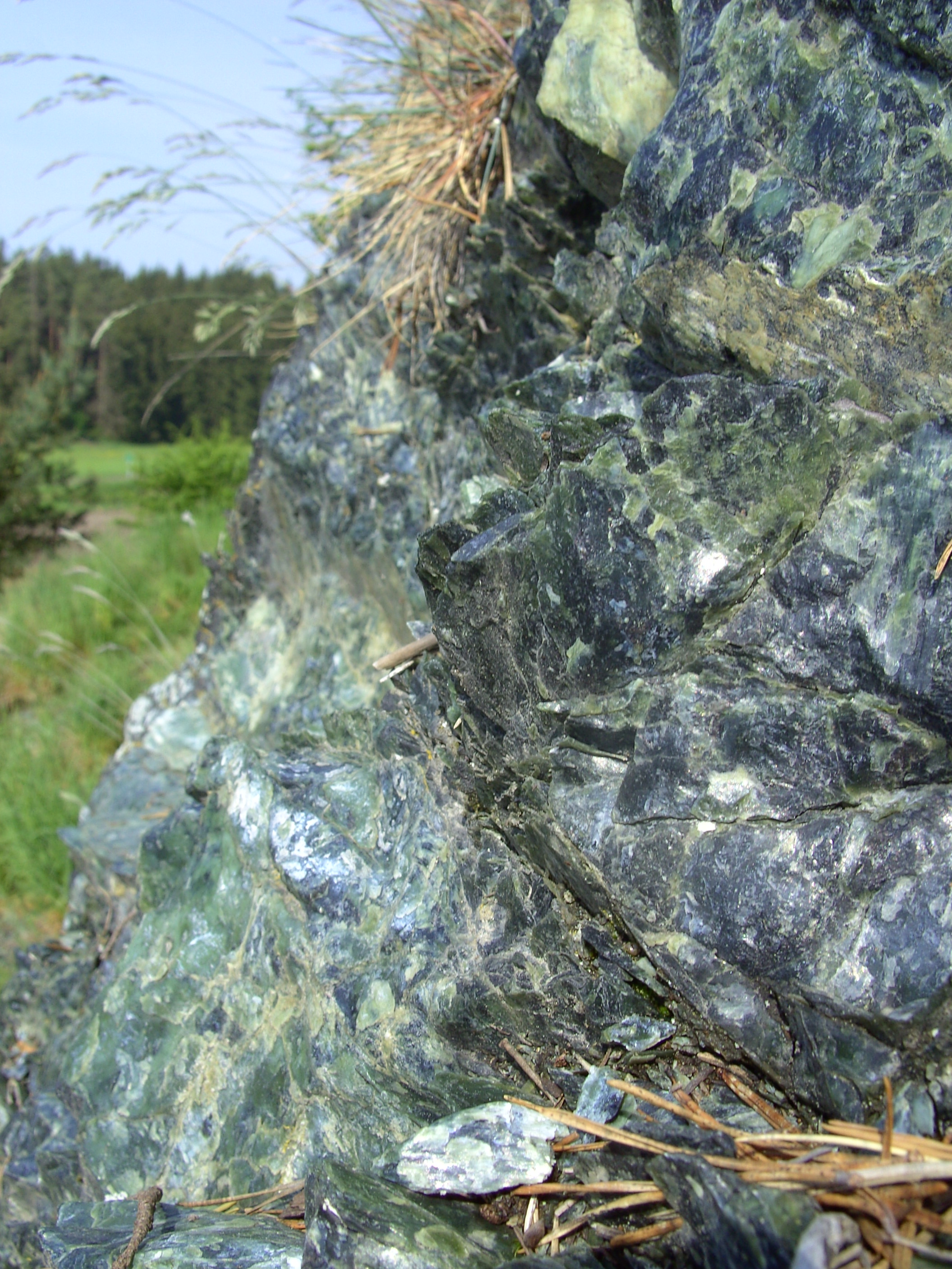 Serpentitgestein an der Wojaleite bei Rehau in Oberfranken